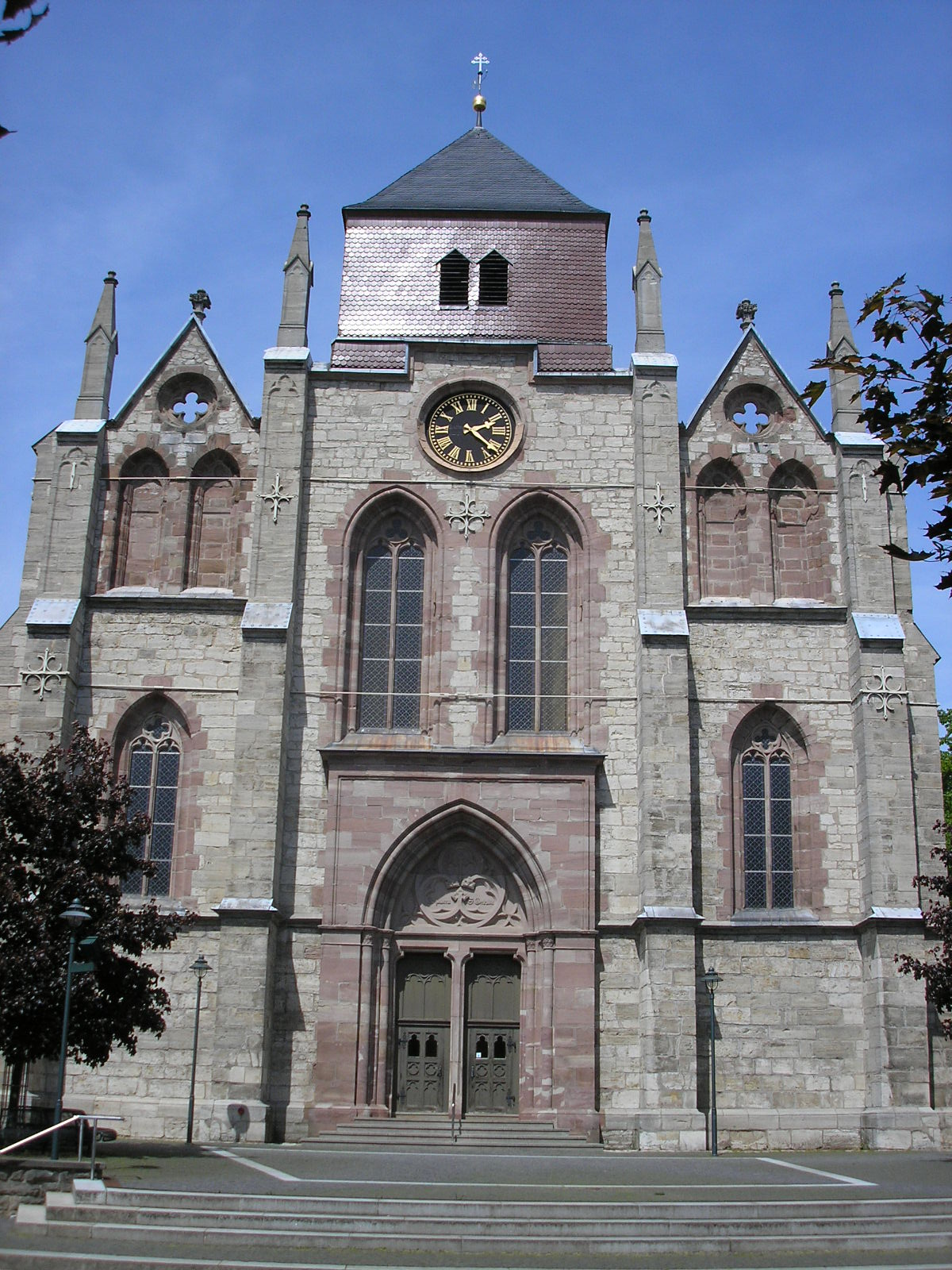 Die Stadtkirche von Dingelstädt (Thüringen).